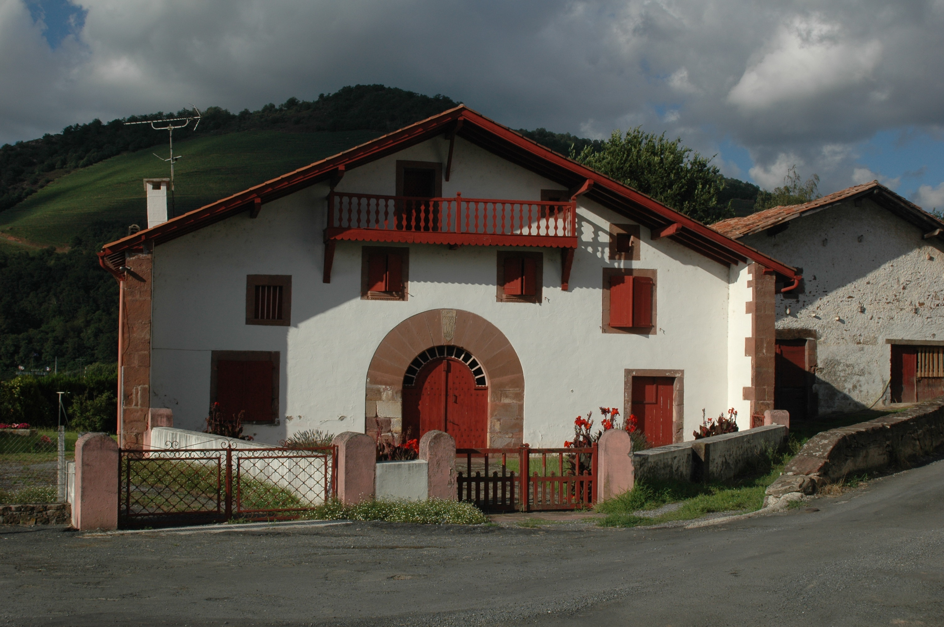 Ascarat, ferme. Photo prise le 03/08/06 par Harrieta171